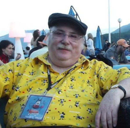 Eric Goldberg au Festival International du Film d'Animation d'Annecy le 11 juin 2013